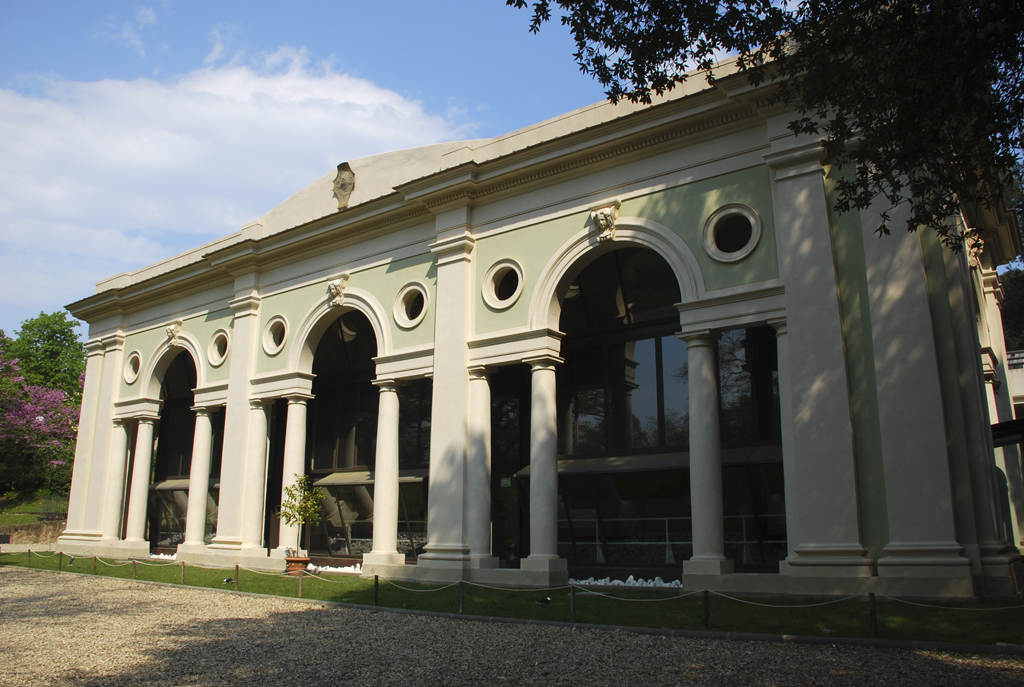 Il Boschetto or Villa Strozzi Park, Florence, Italy. Villa Strozzi Lemon-House (Wintergarten). Facade.